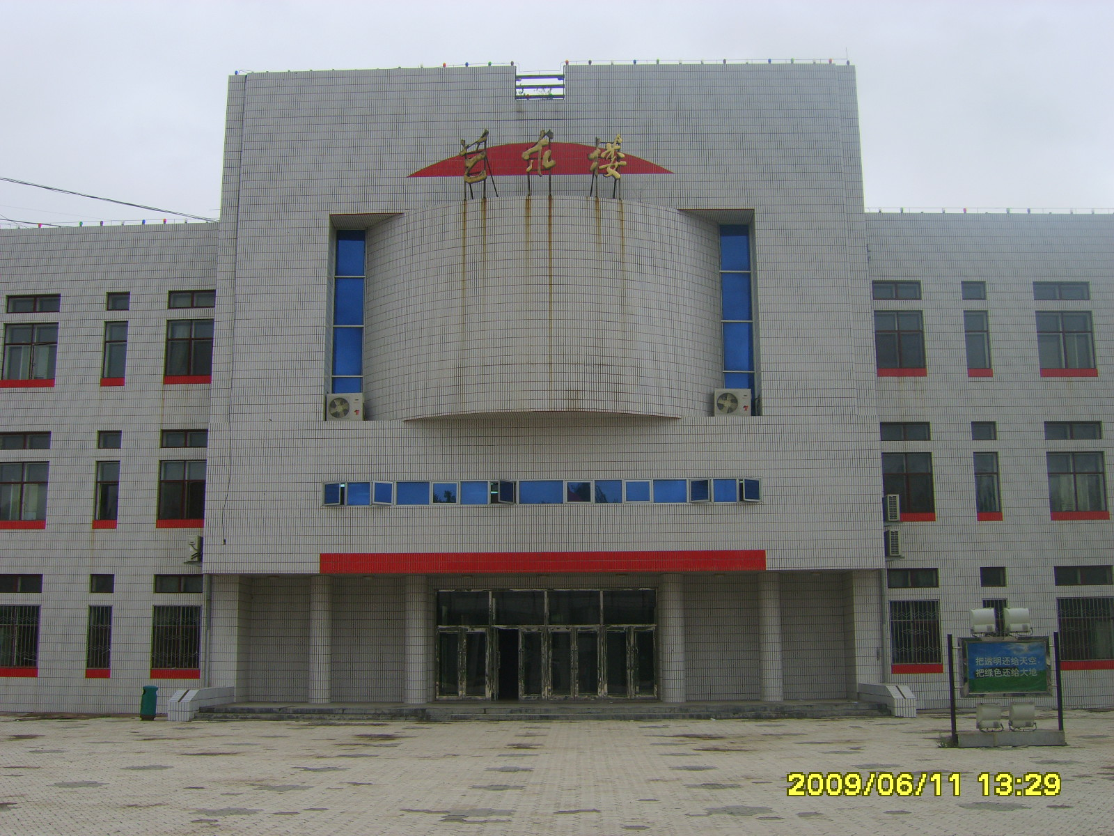 黑龙江省大庆市第一中学的艺术楼